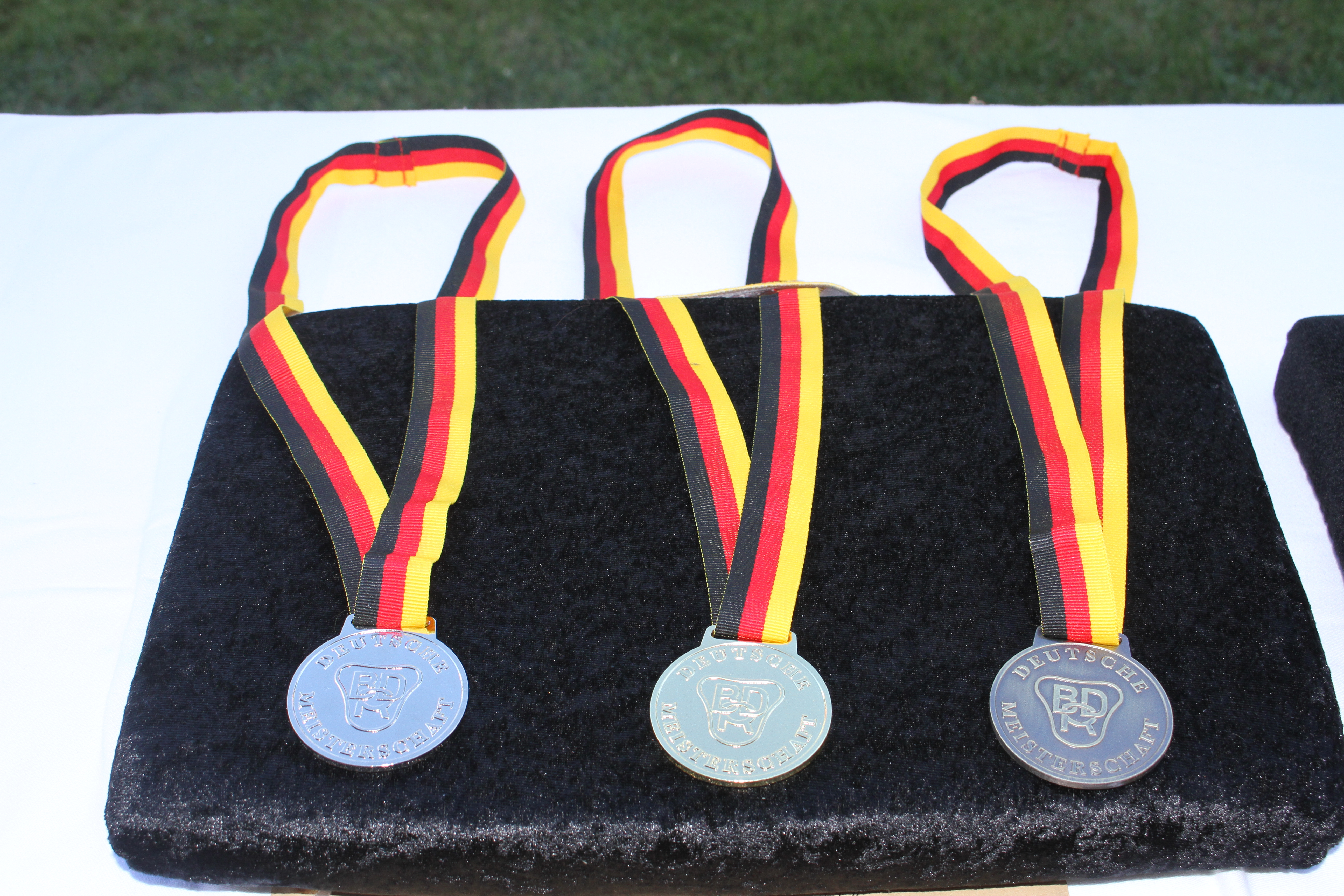 Medaillen